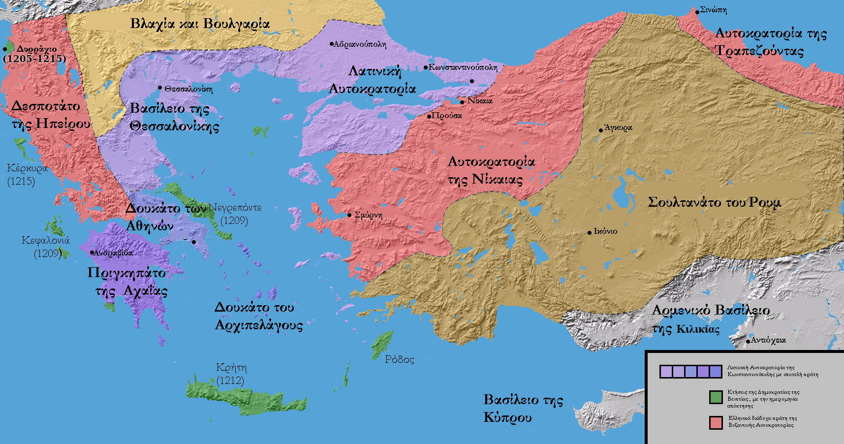 Τα κράτη που προέκυψαν μετά την κατάκτηση της Κωνσταντινούπολης το 1204. Τα σύνορα είναι κατά προσέγγιση.